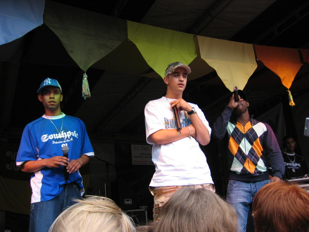 Yes-R samen met Derenzo en Soesi B op het Kleurijk Wijk festival.